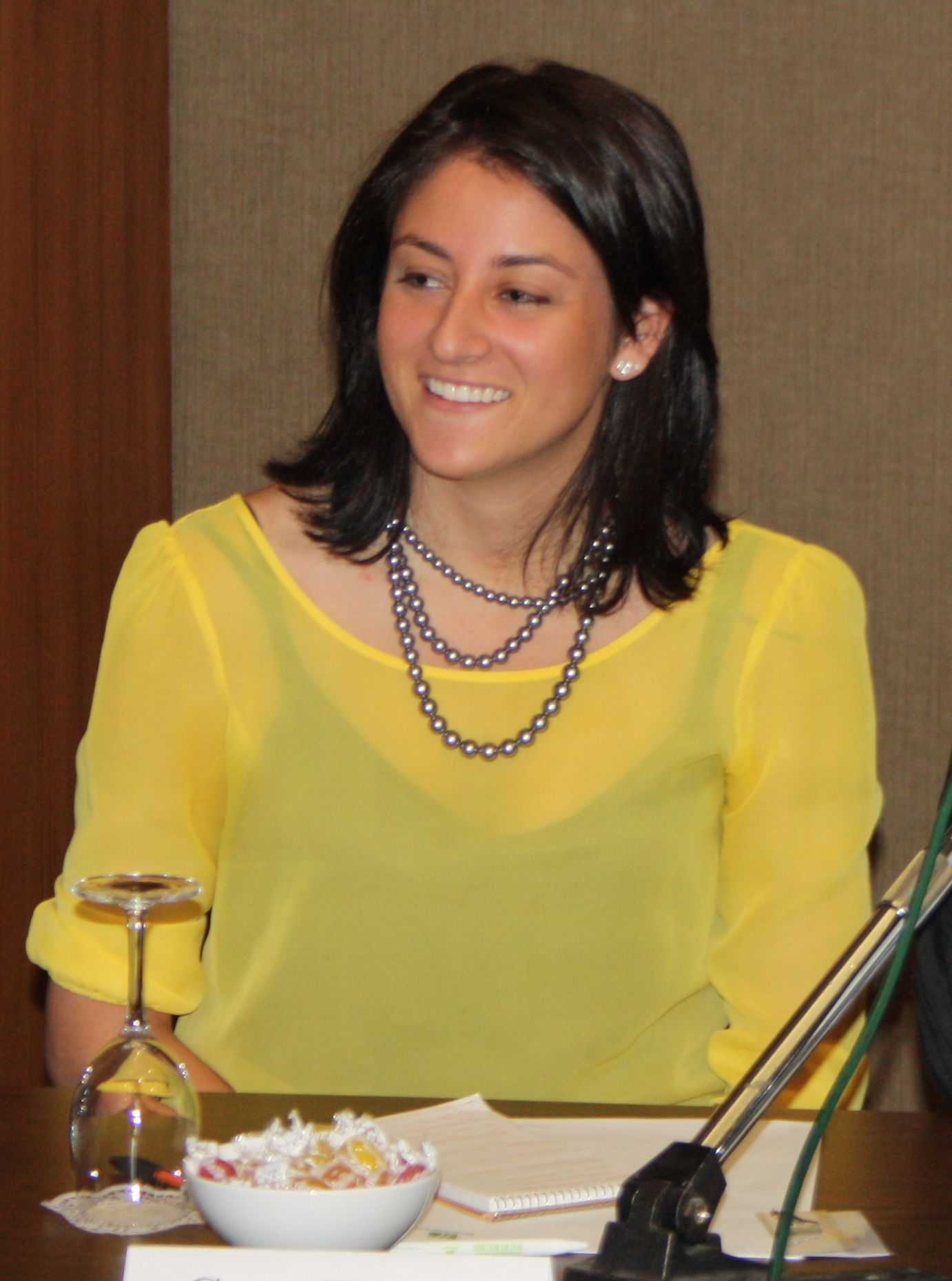 Sara Ganim (Сара Ганим) - crime reporter for the The Patriot-News.